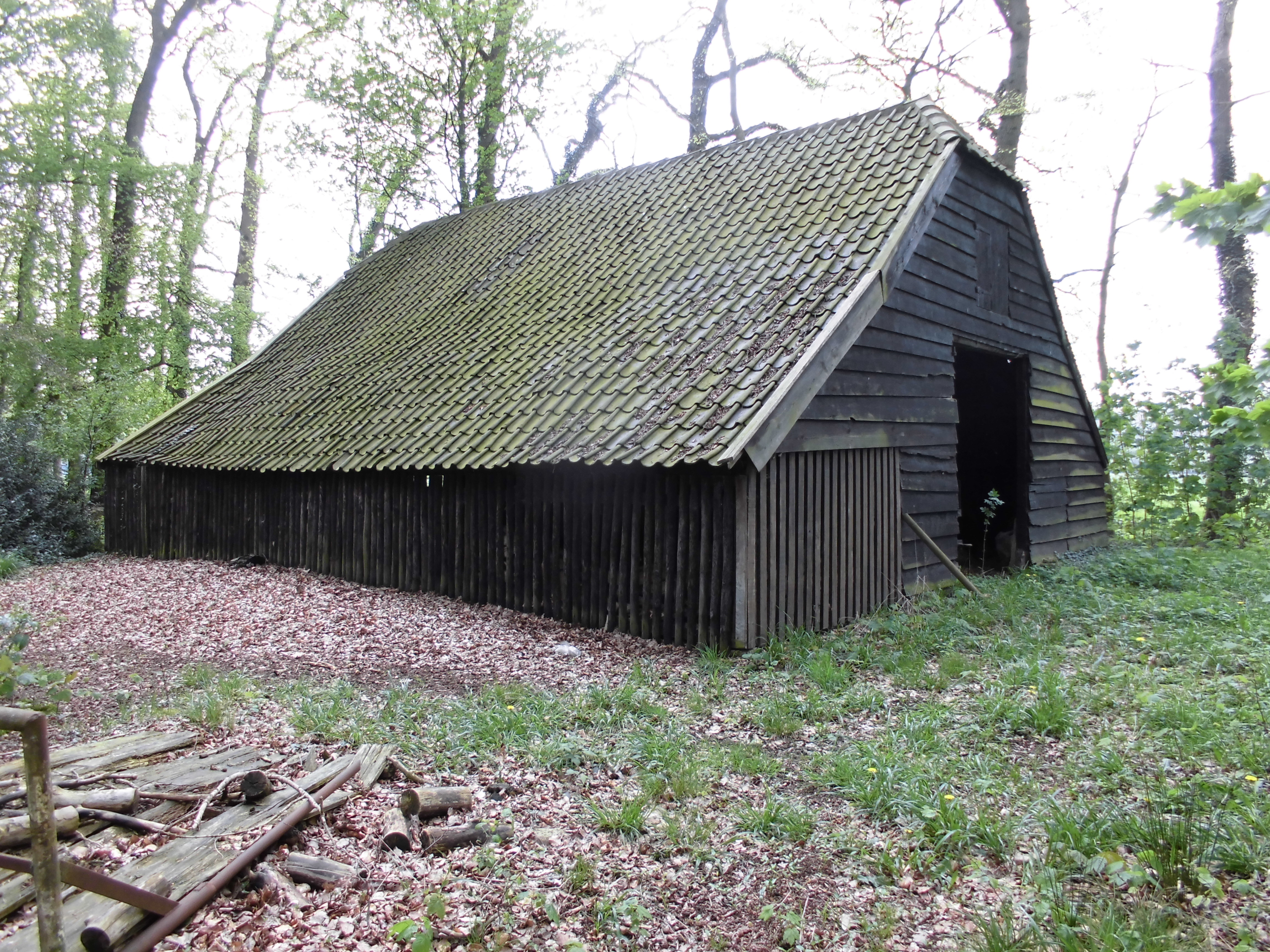 Leeuwenburg, Houtschuur Driebergen-Rijsenburg